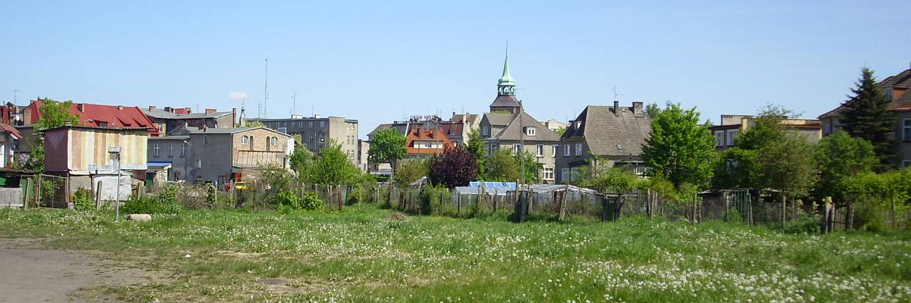 Białogard. Panorama miasta od strony południowej.